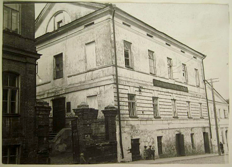 Беларуская (тарашкевіца): Менск (Miensk), вуліца Валоцкая (vulica Vałockaja)